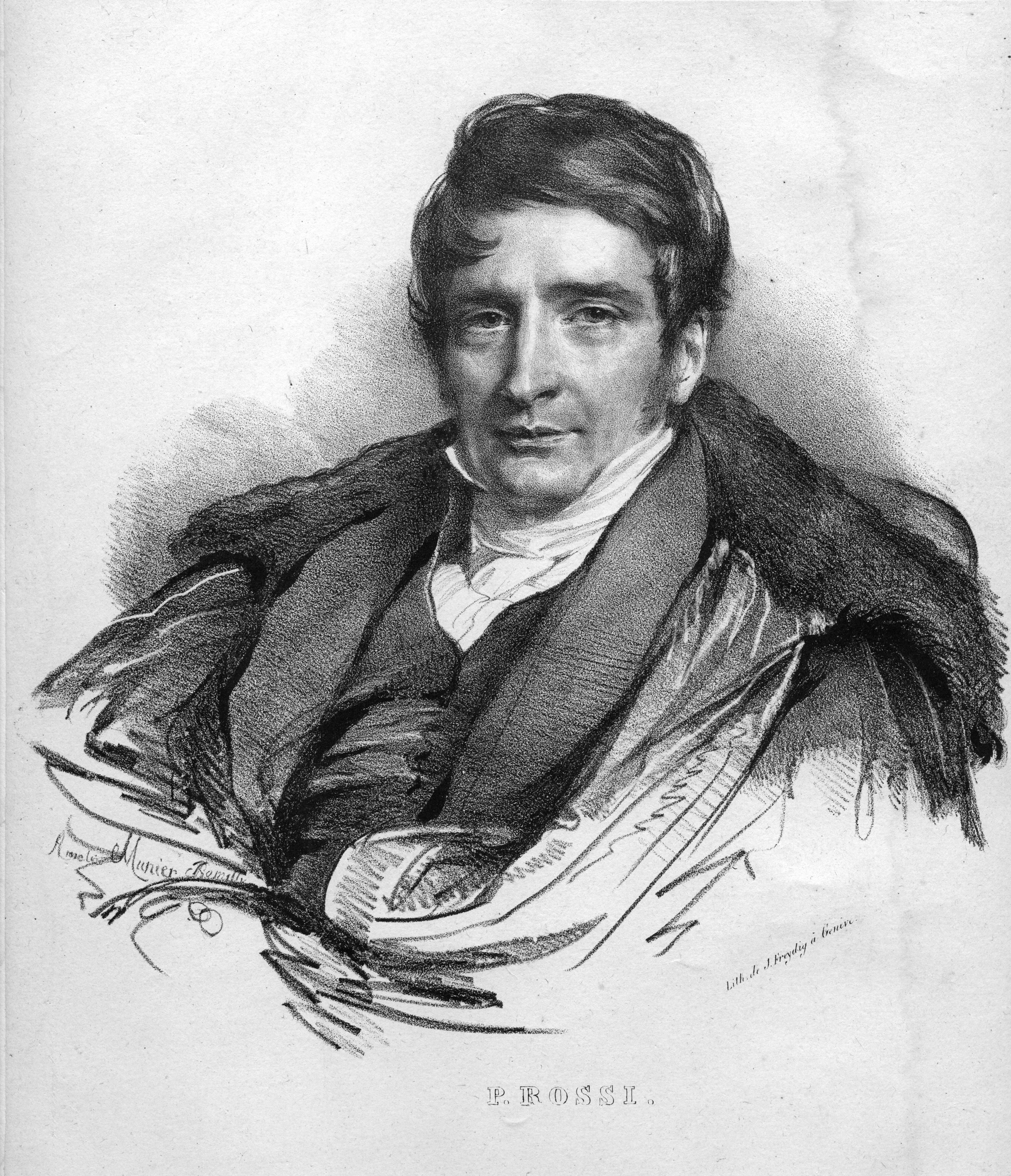 Portrait de Pellegrino Rossi (1787-1848)